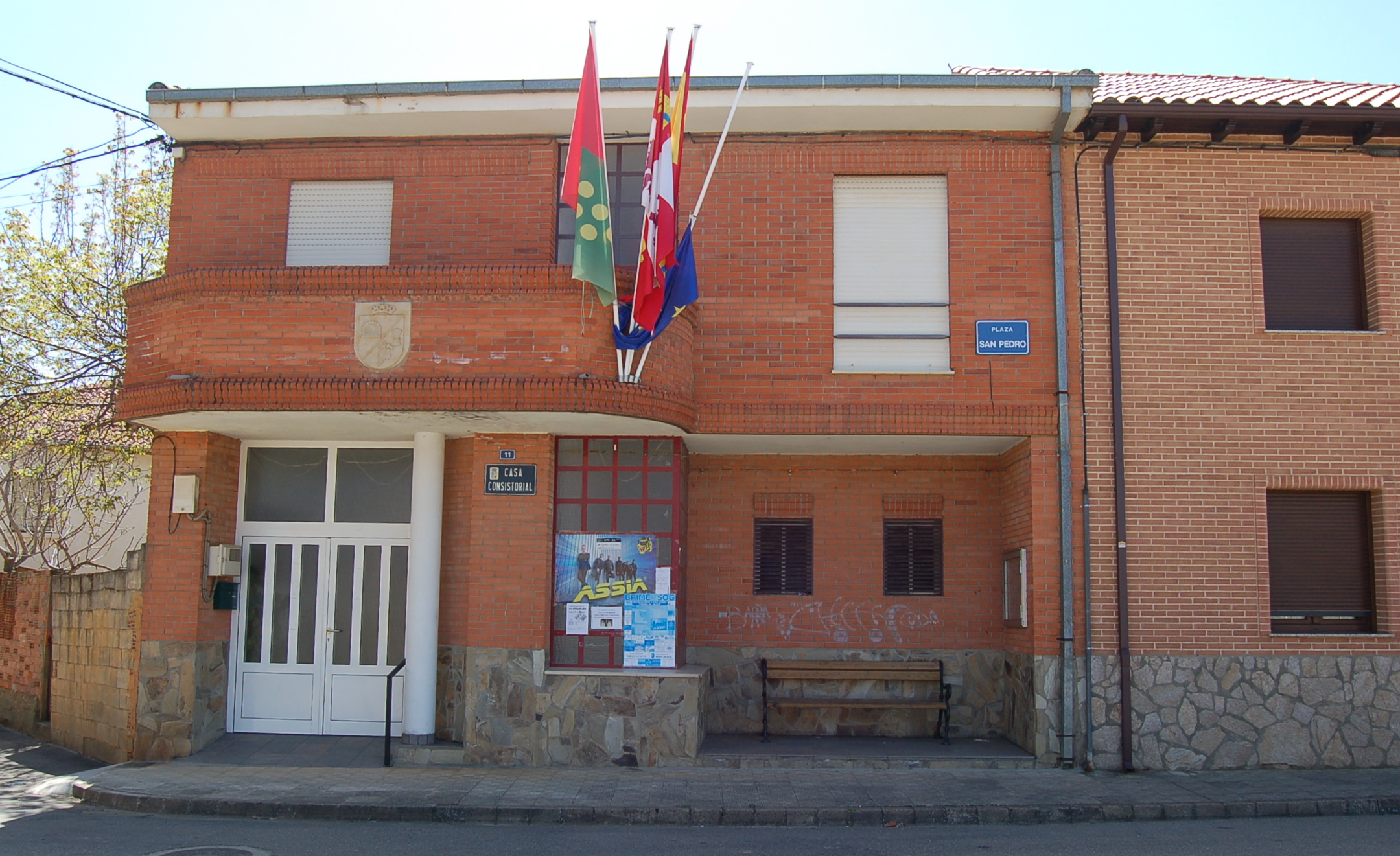 Casa consistorial de Brime de Sog